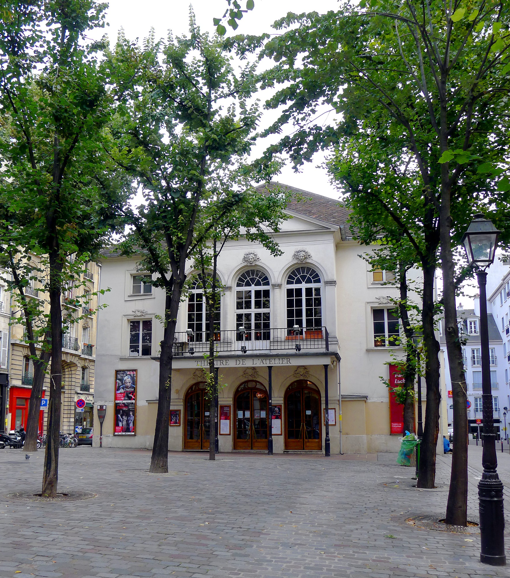 Théâtre de l'Atelier sur la place Charles-Dullin - Paris XVIII